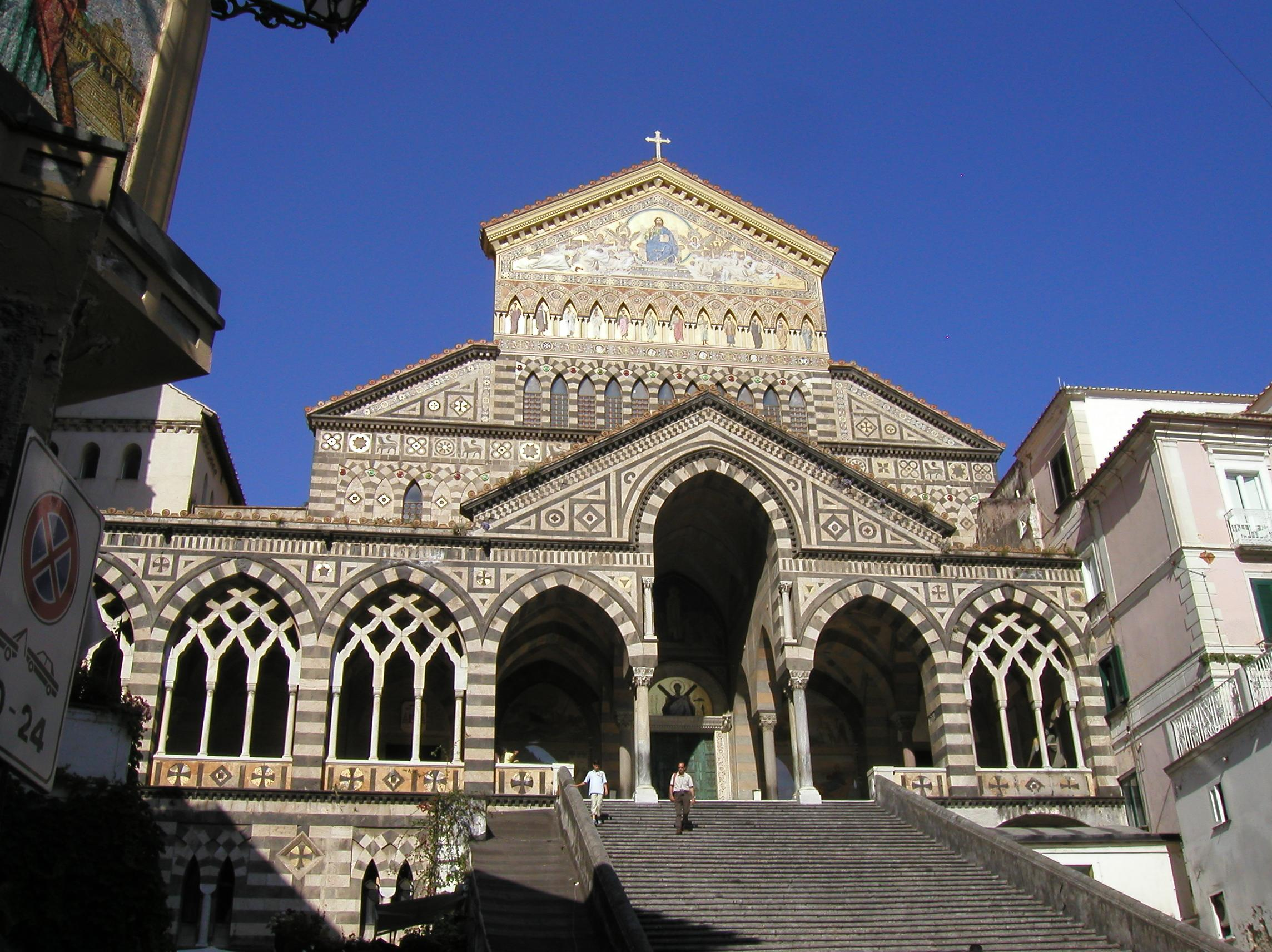 2003年6月21日撮影 -- 投稿者による撮影